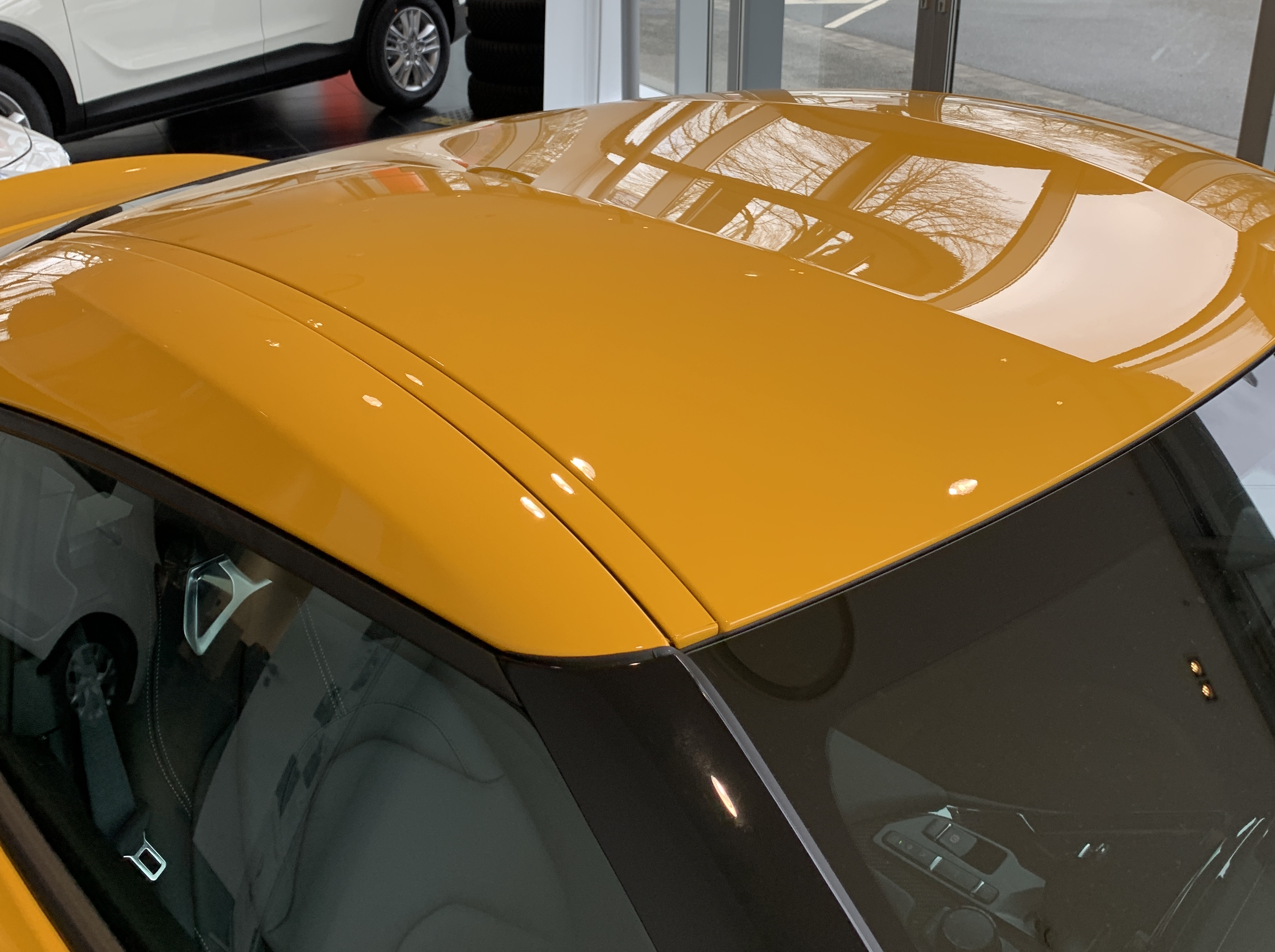 Toyota Supra Detailansicht "Double-Bubble-Dach"